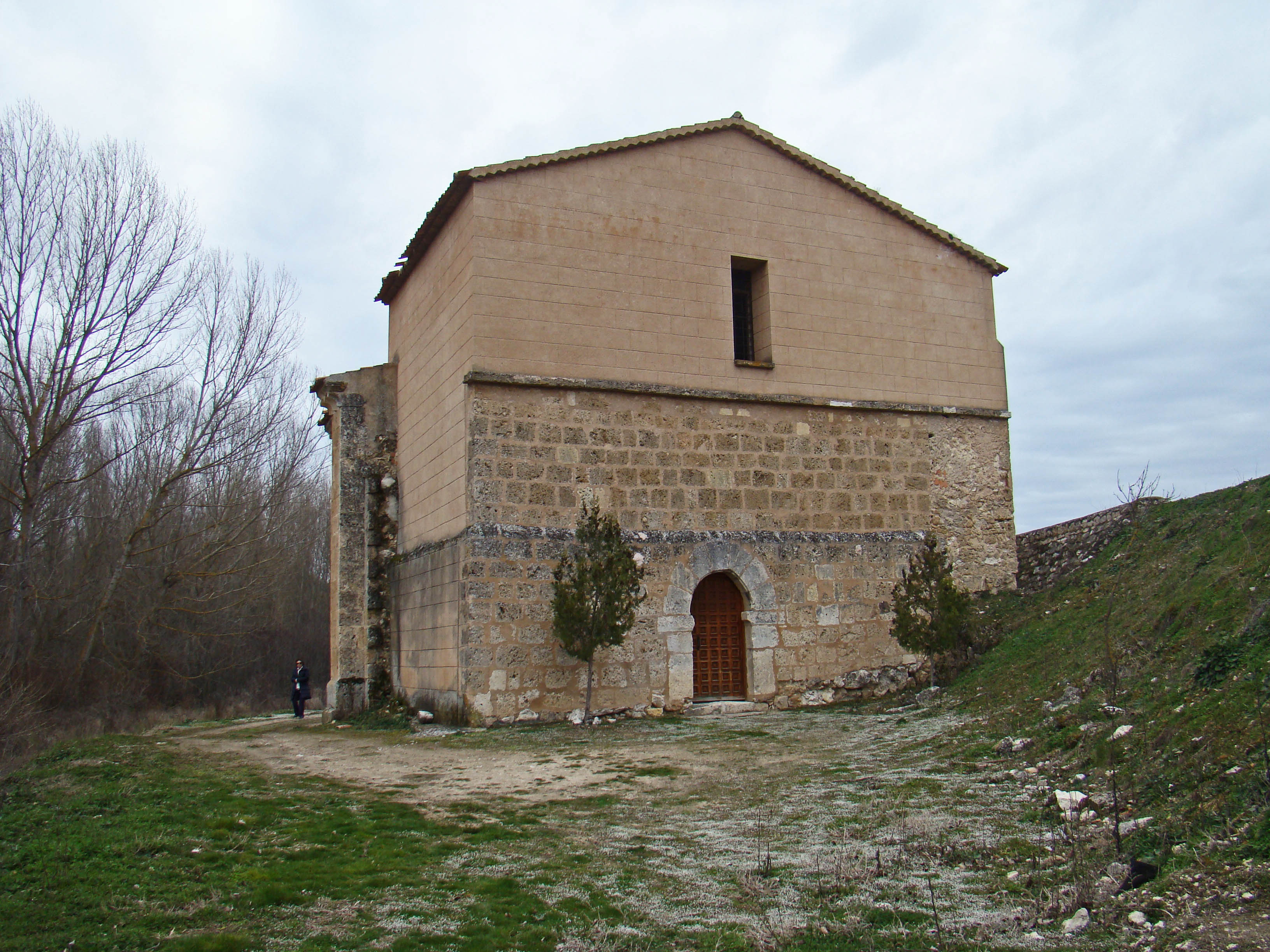 Vista la ermita de San Vicente en el término de Fuentesoto de Segovia, España. Muro oeste.